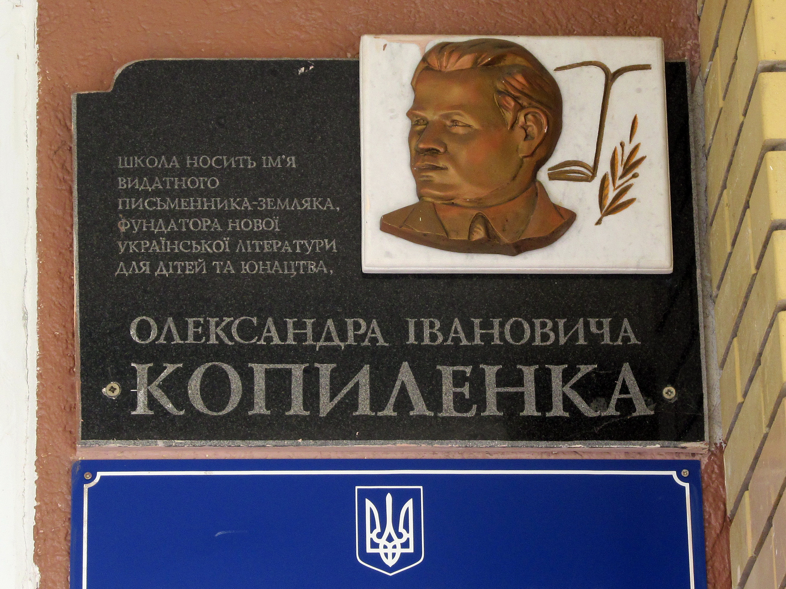 Меморіальна дошка, присвячена Олександру Копиленку, на фасаді школи №1 в м. Красноград Харківської області, вул. Лермонтова, 49